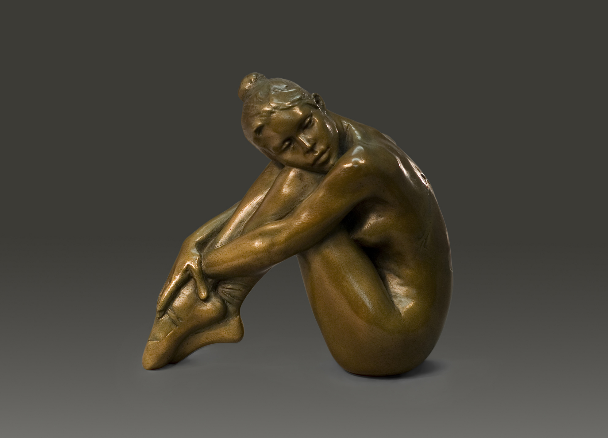 Sculpture en bronze créée par Jacques Le Nantec.